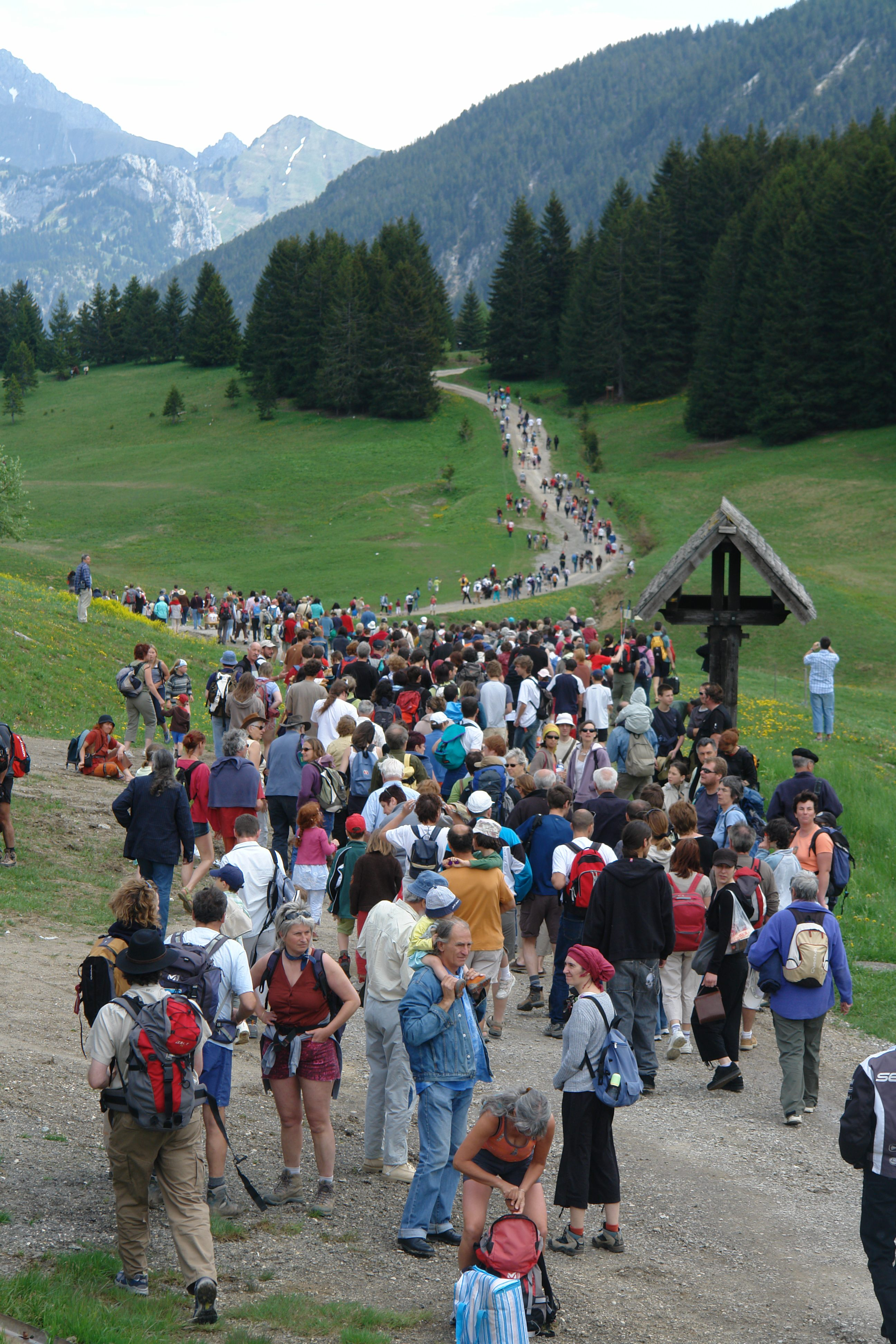 Rassemblement citoyen Glières